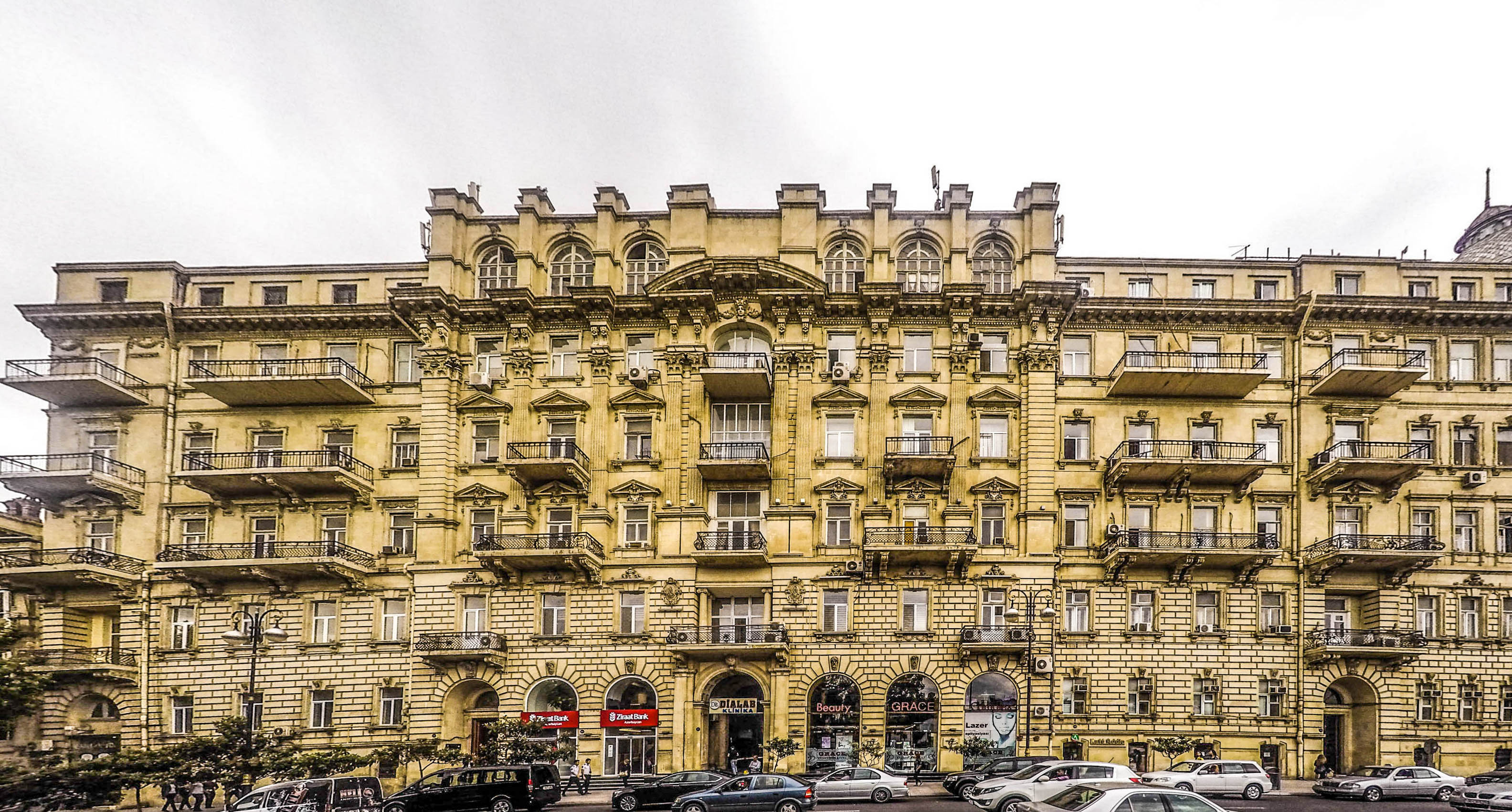 Mirzəbəyov qardaşlarının evi